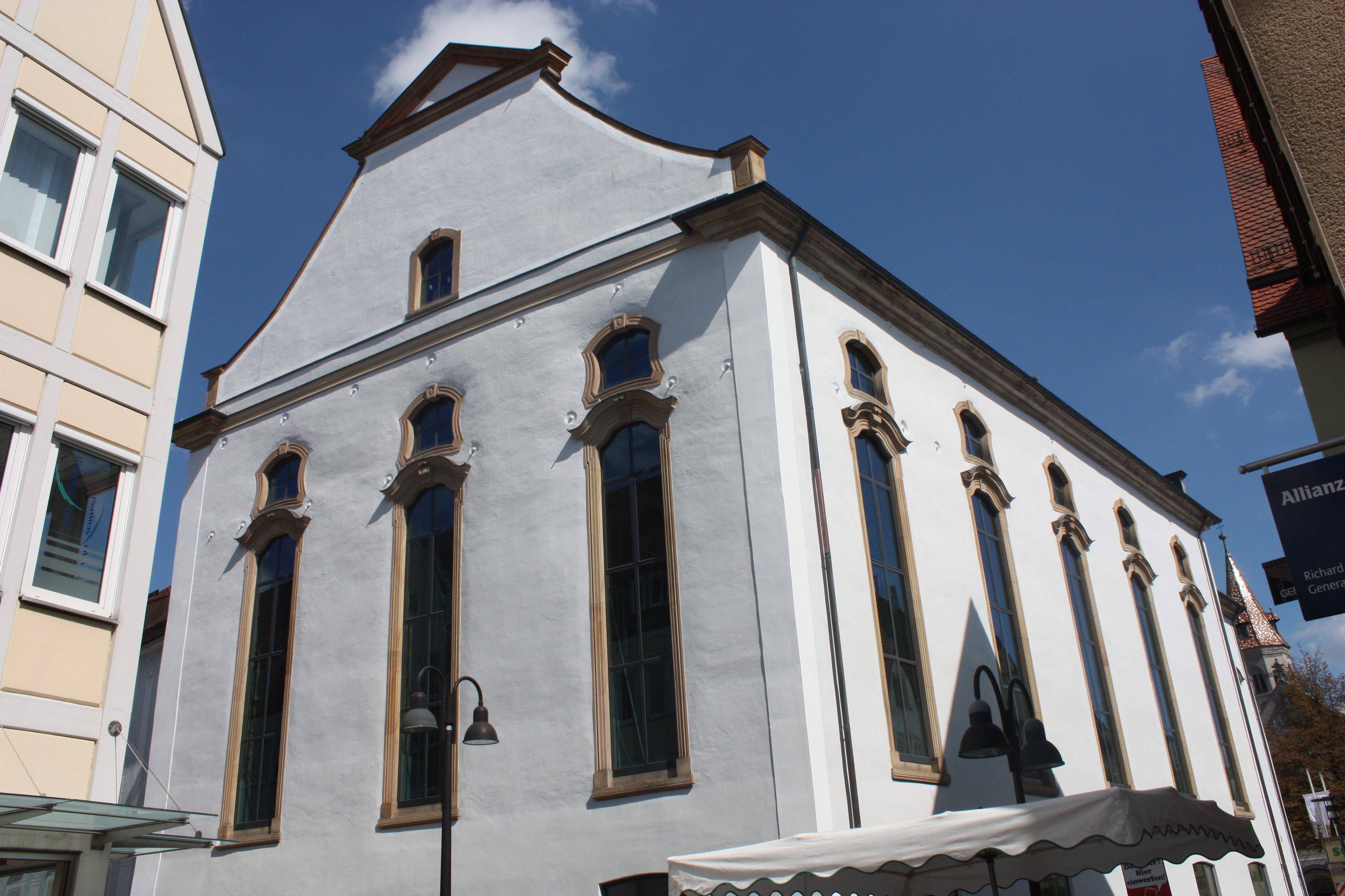 Westfassade der ehemaligen Kirche des Predigerklosters in Schwäbisch Gmünd